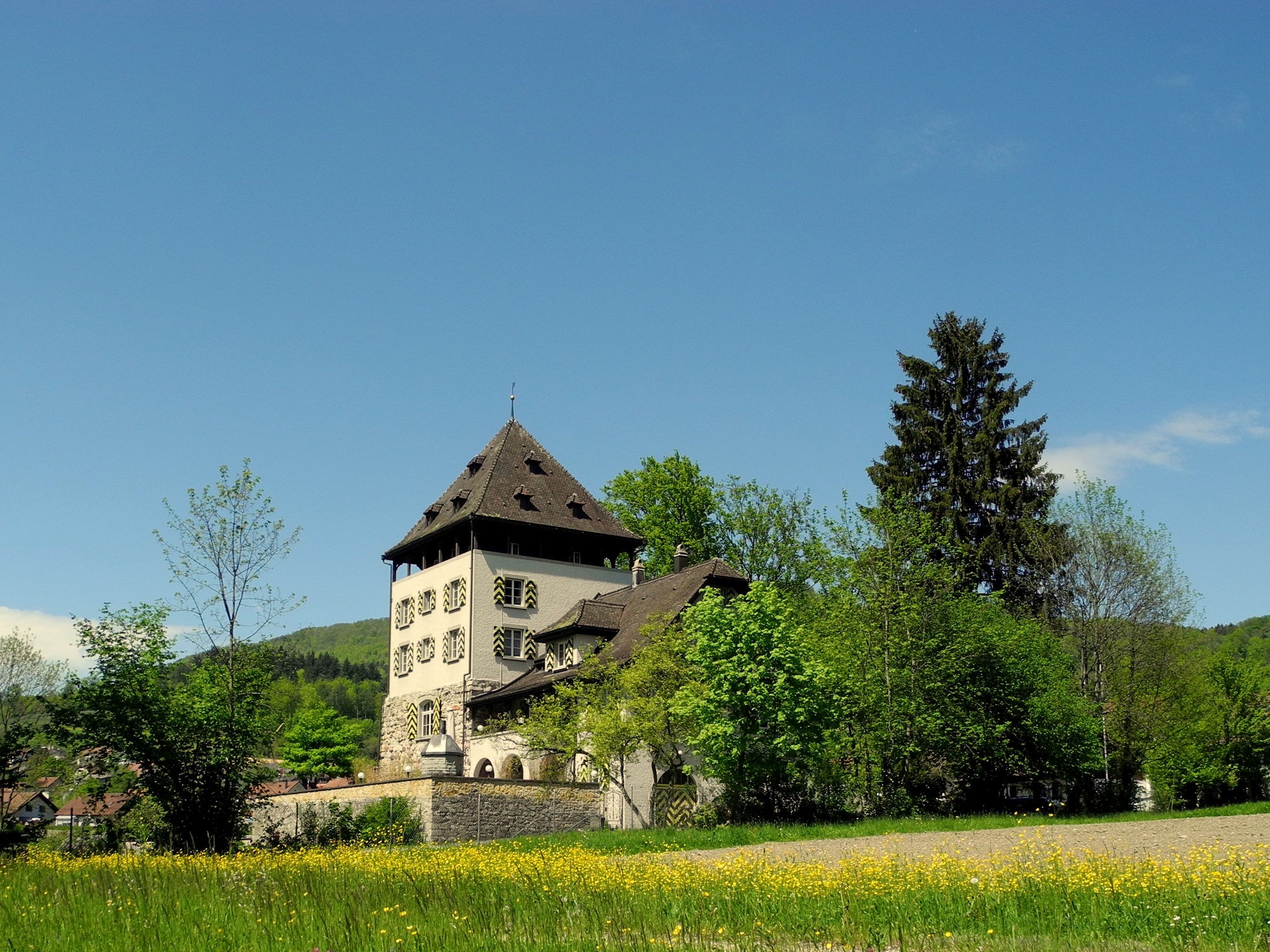 Schloss Auenstein